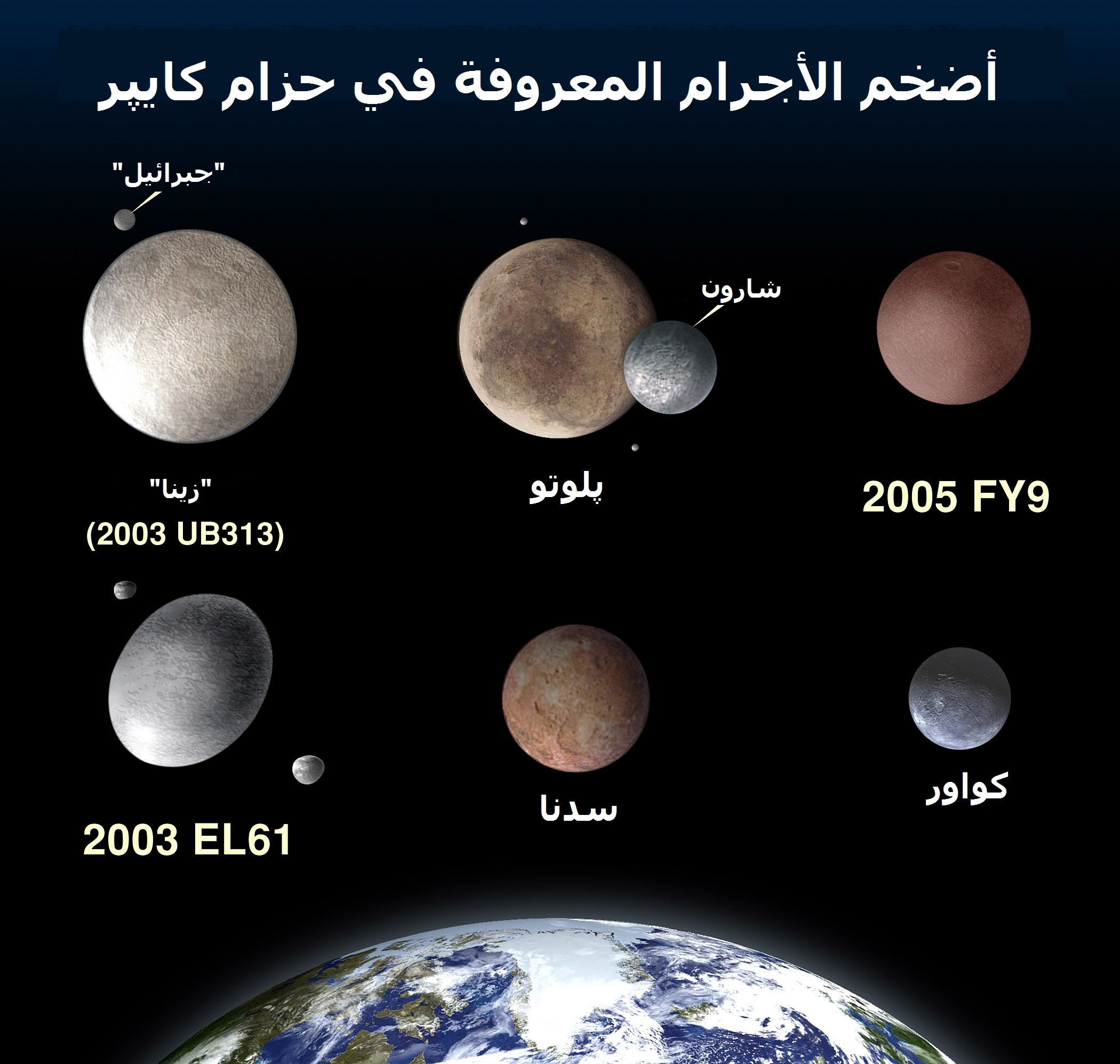 الكوكب القزم 2003 UB313 بالمُقارنة مع بلوتو، 2005 FY9، 2003 EL61، سدنا، كواور، والأرض.